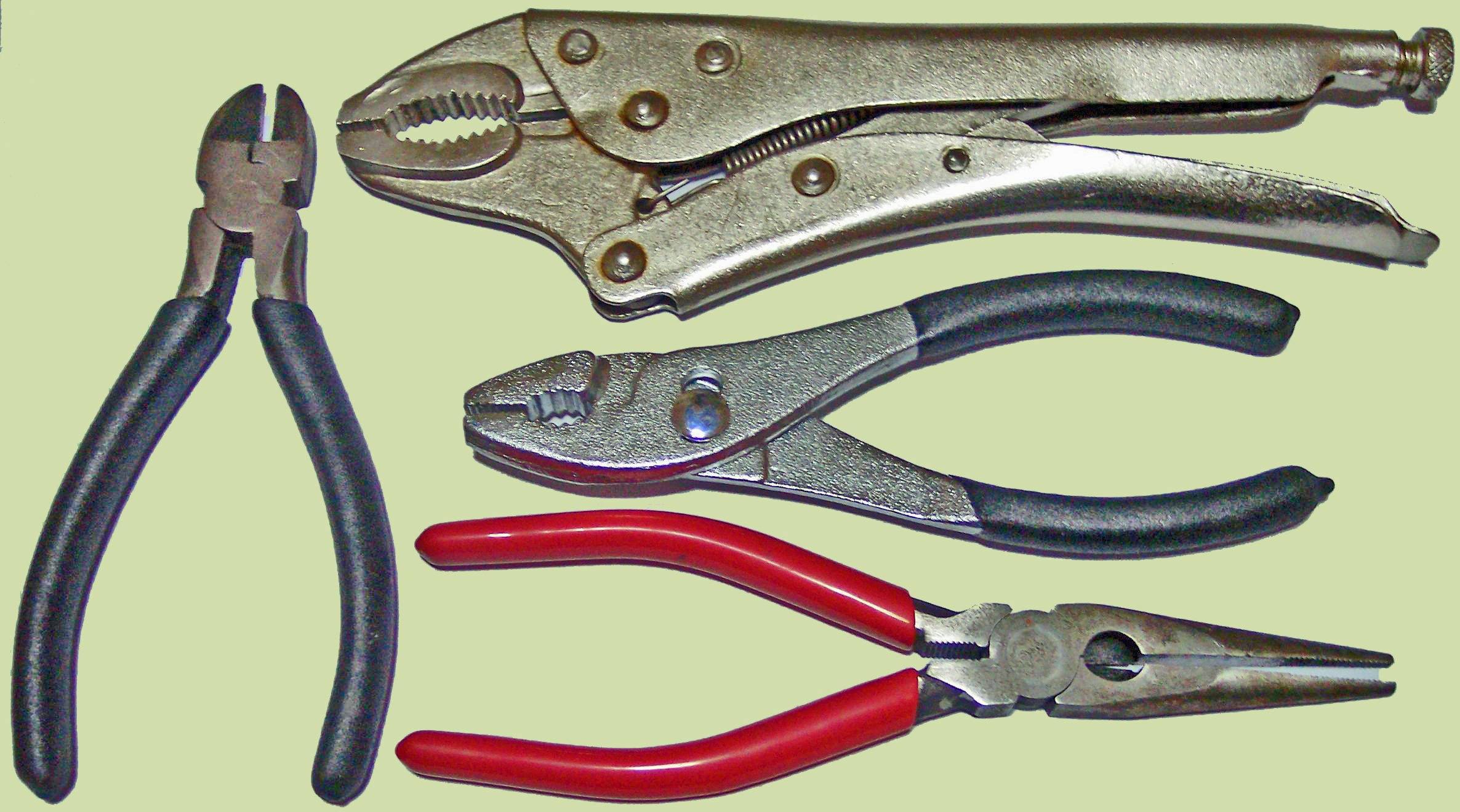 Juego de alicates de mecánicos